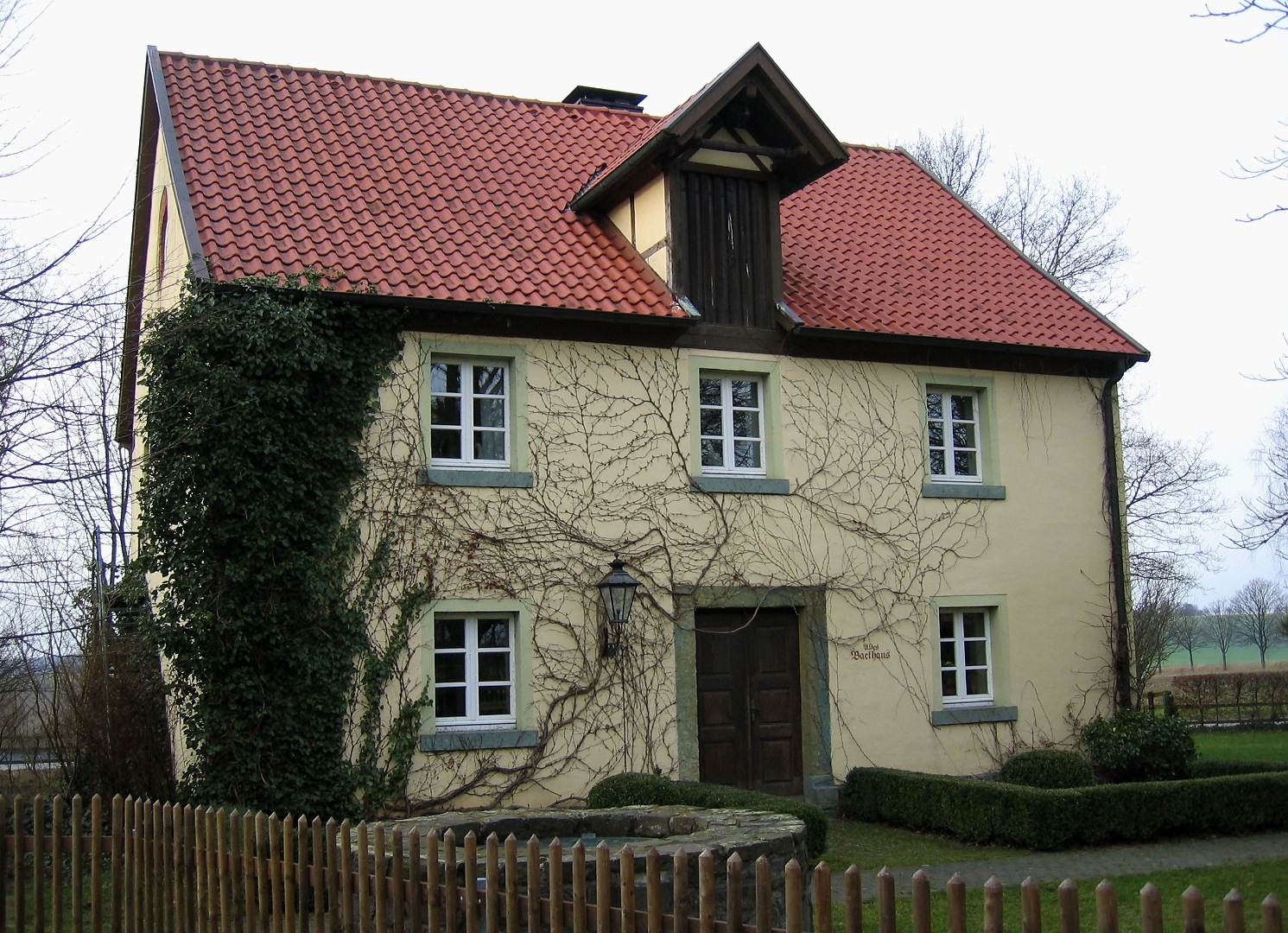 „Altes Backhaus“ im Ortsteil Delecke (Drüggelter Höfe) der Gemeinde Möhnesee.